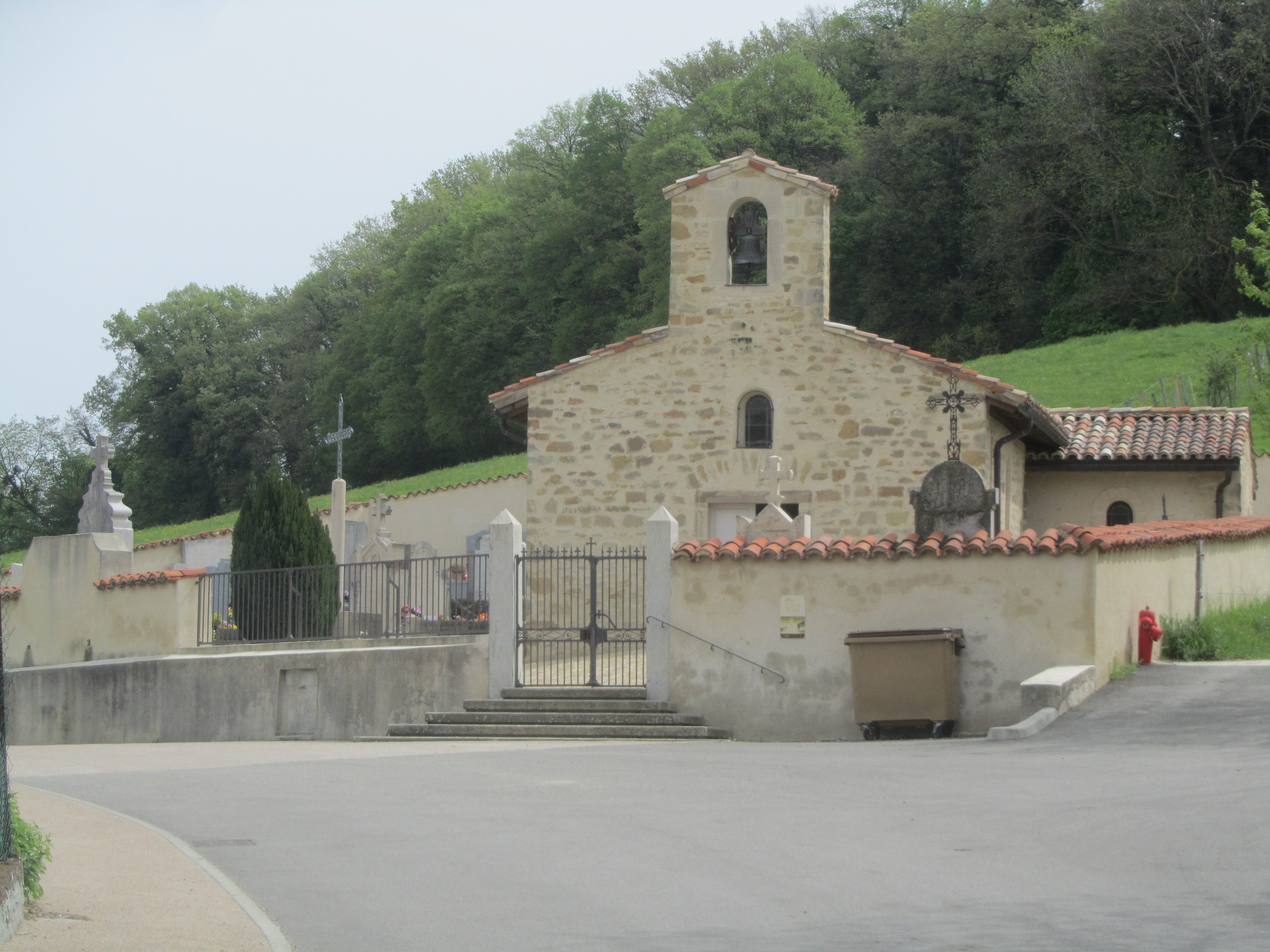 Chapelle Saint-Thomas à Saint-Pierre-de-Chandieu